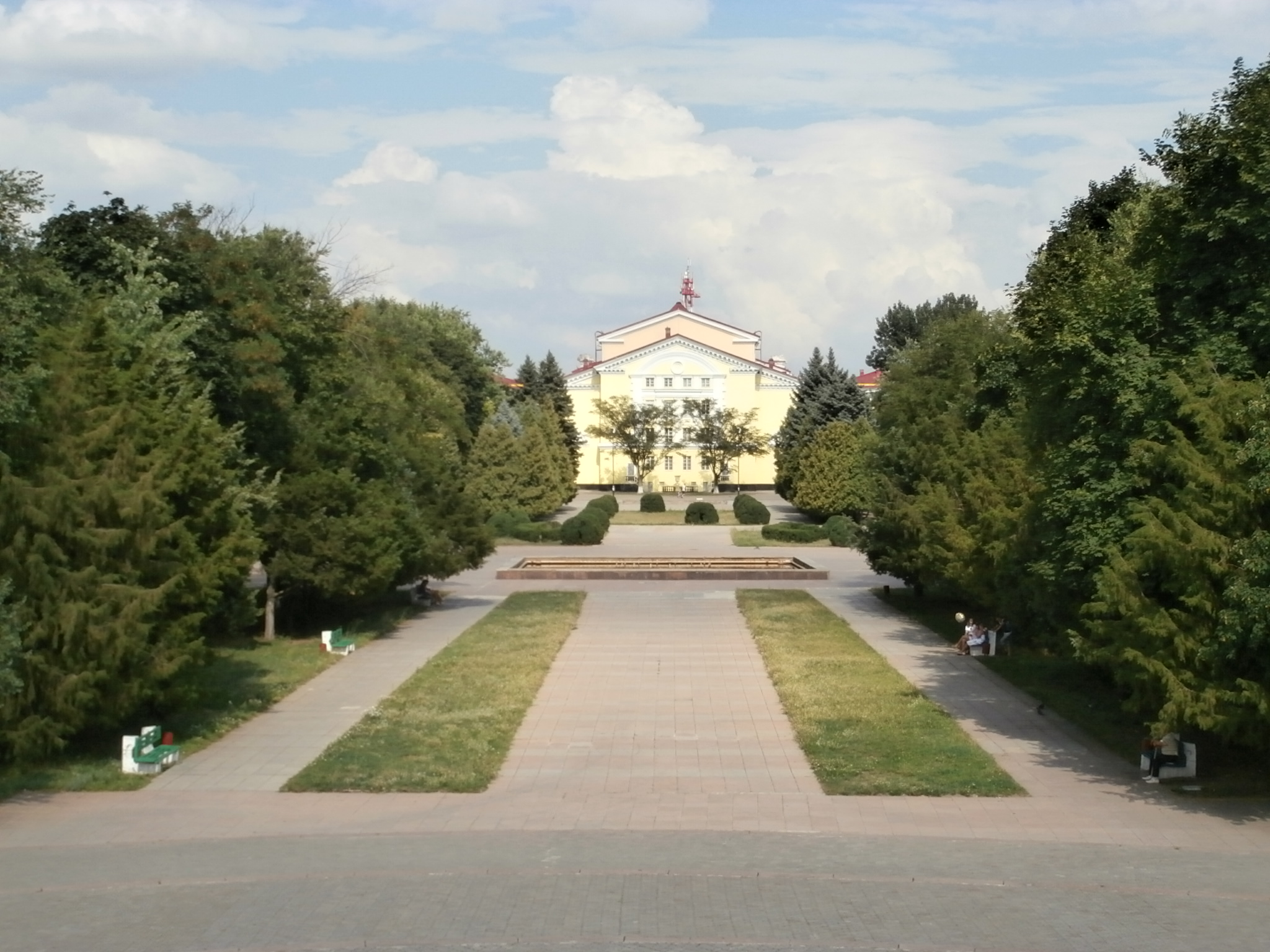 Palast der Kultur vom Bohdan Chmelnyzkyj-Denkmal aus gesehen